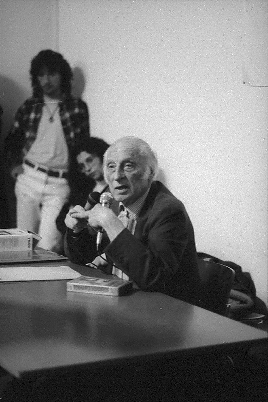 Hans Ruesch in conferenza a Tradate, 1993